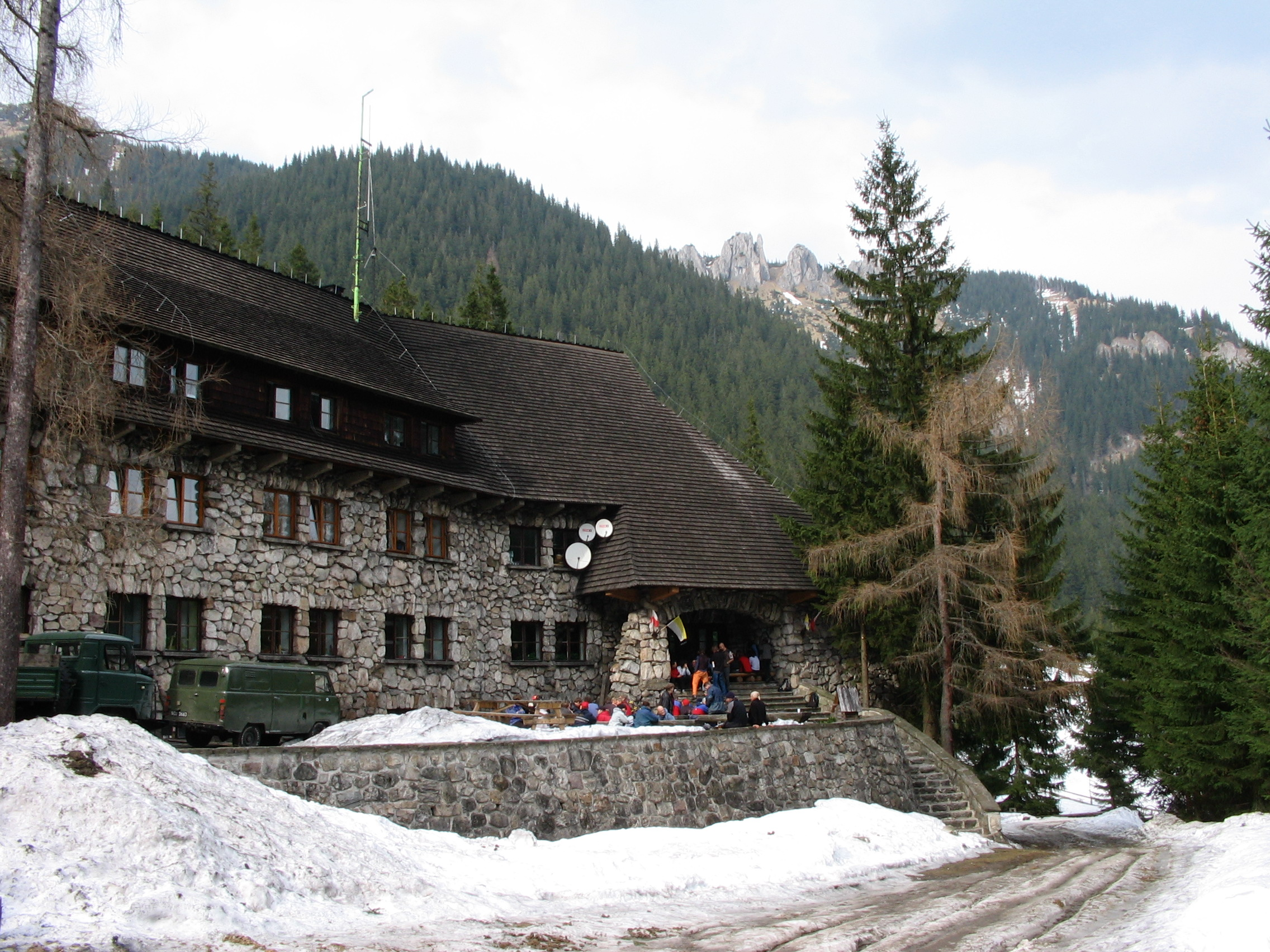 Dolina Chochołowska - schronisko PTTK (Tatry)